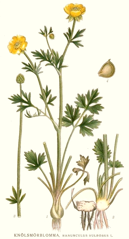 Original Description Knölsmörblomma, Ranunculus bulbosus L.